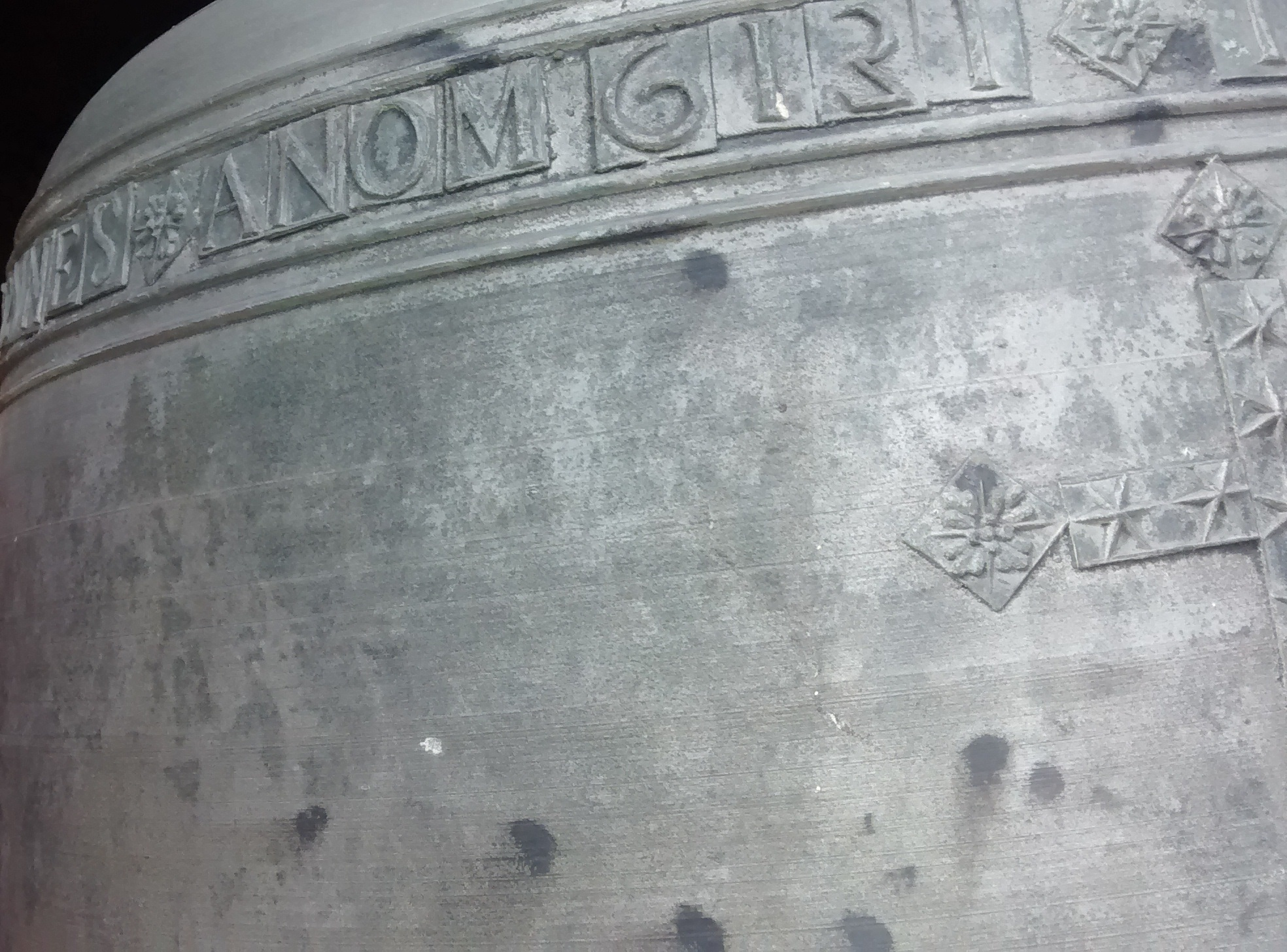 Año en la Campana de María Magdalena de Huertapelayo.